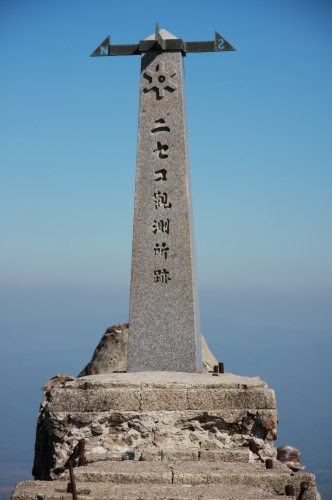 ニセコ観測所跡：ニセコアンヌプリ山頂